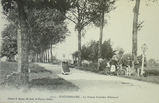 Frontière franco-allemande à limite des communes de Foussemagne et Chavannes-sur-l'Étang (près de Belfort (France)).